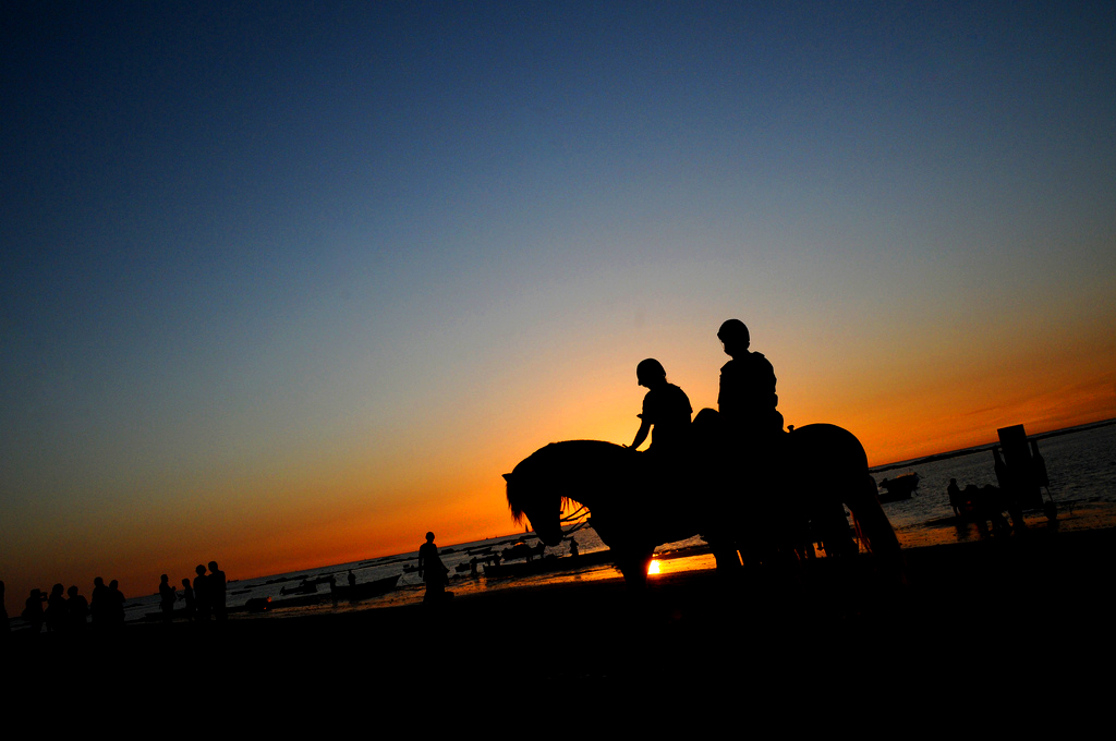 Puesta de sol de dos policias montados a caballo controlando las Carreras de Caballos de Sanlúcar.